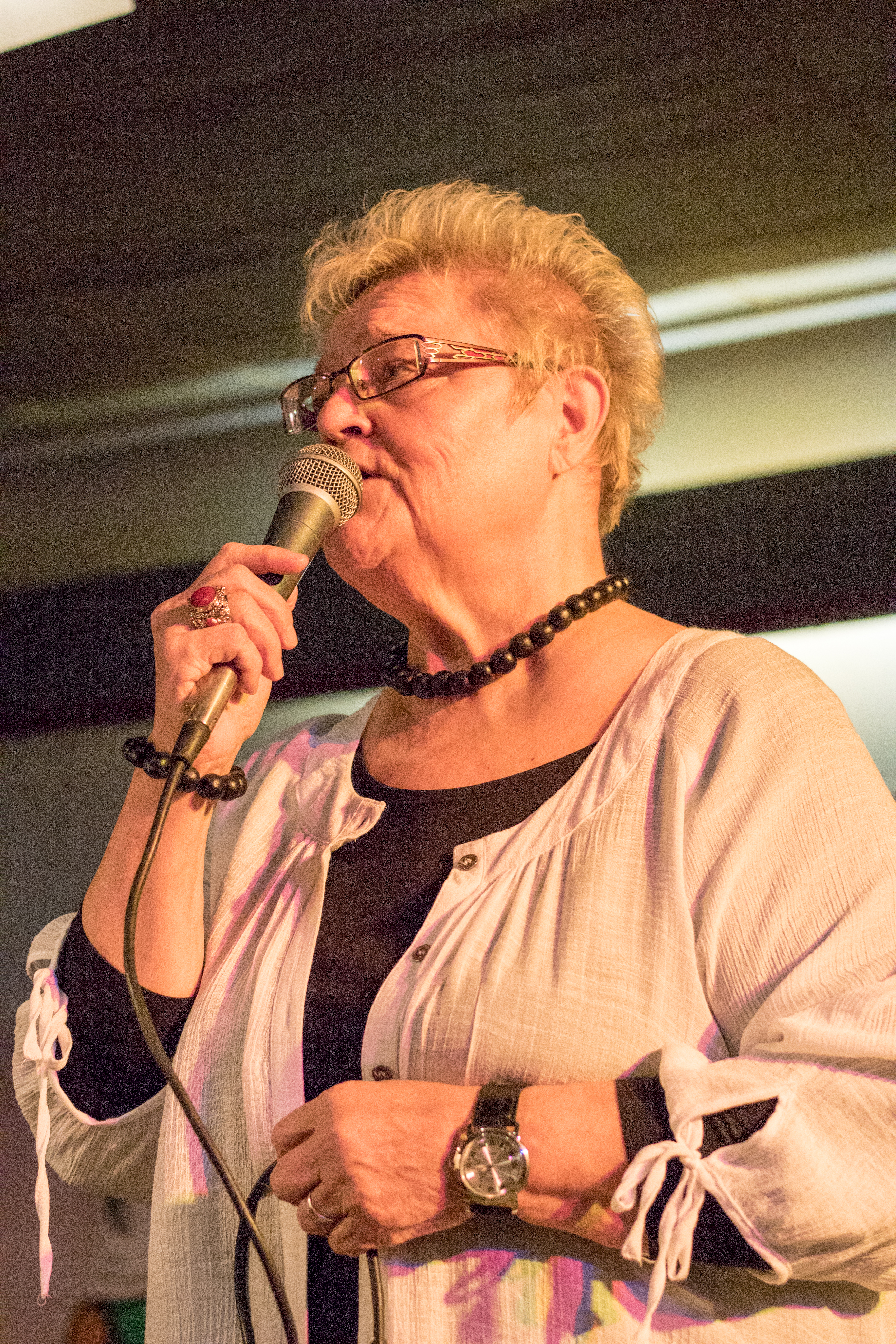 Arja Havakka suomalainen laulaja